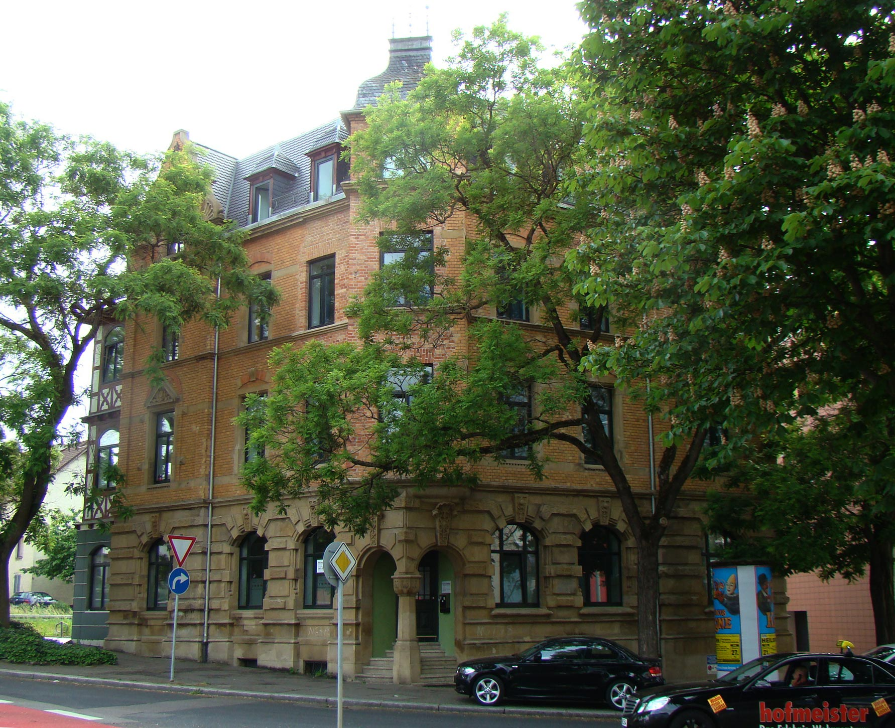 Heilbronn, Charlottenstraße 2, ehem. Metro Bar